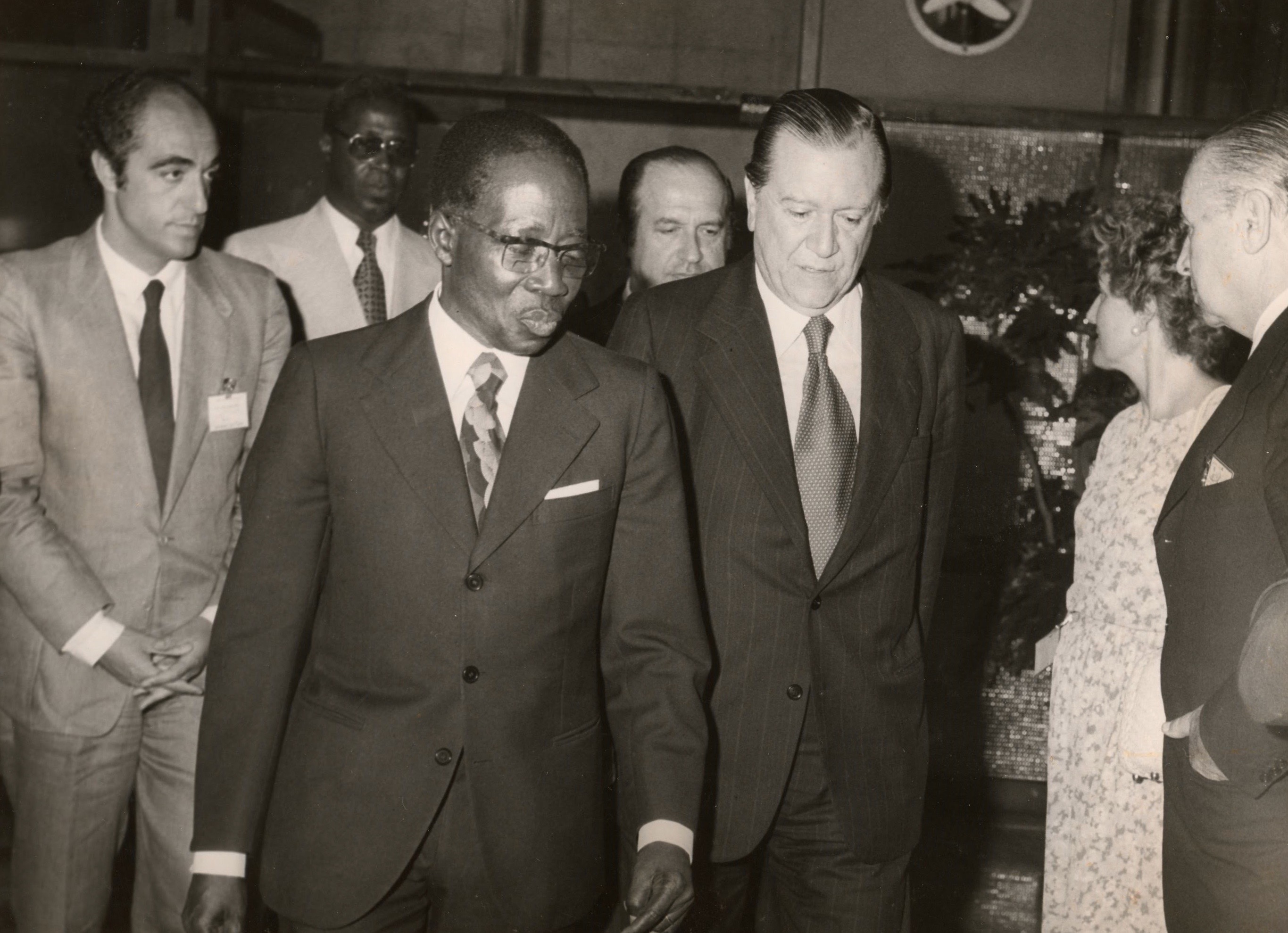 Rafael Caldera recibiendo al presidente de Senegal, Leopold Senghor-Original en la Cumbre Mundial de Reforma Agraria de la Fao en Roma.